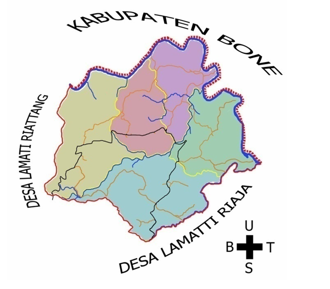 Lokasi Desa Lamatti Riawang